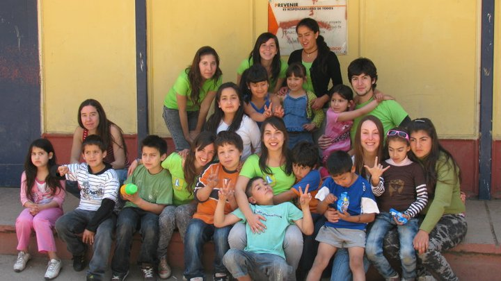 Primera Generación de Recrea